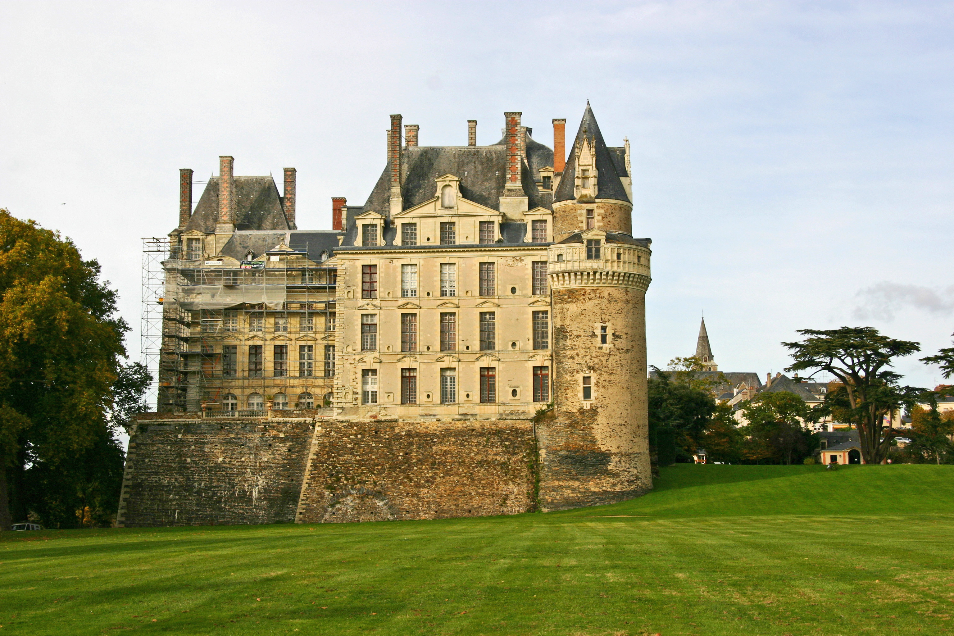 Schloss Brissac